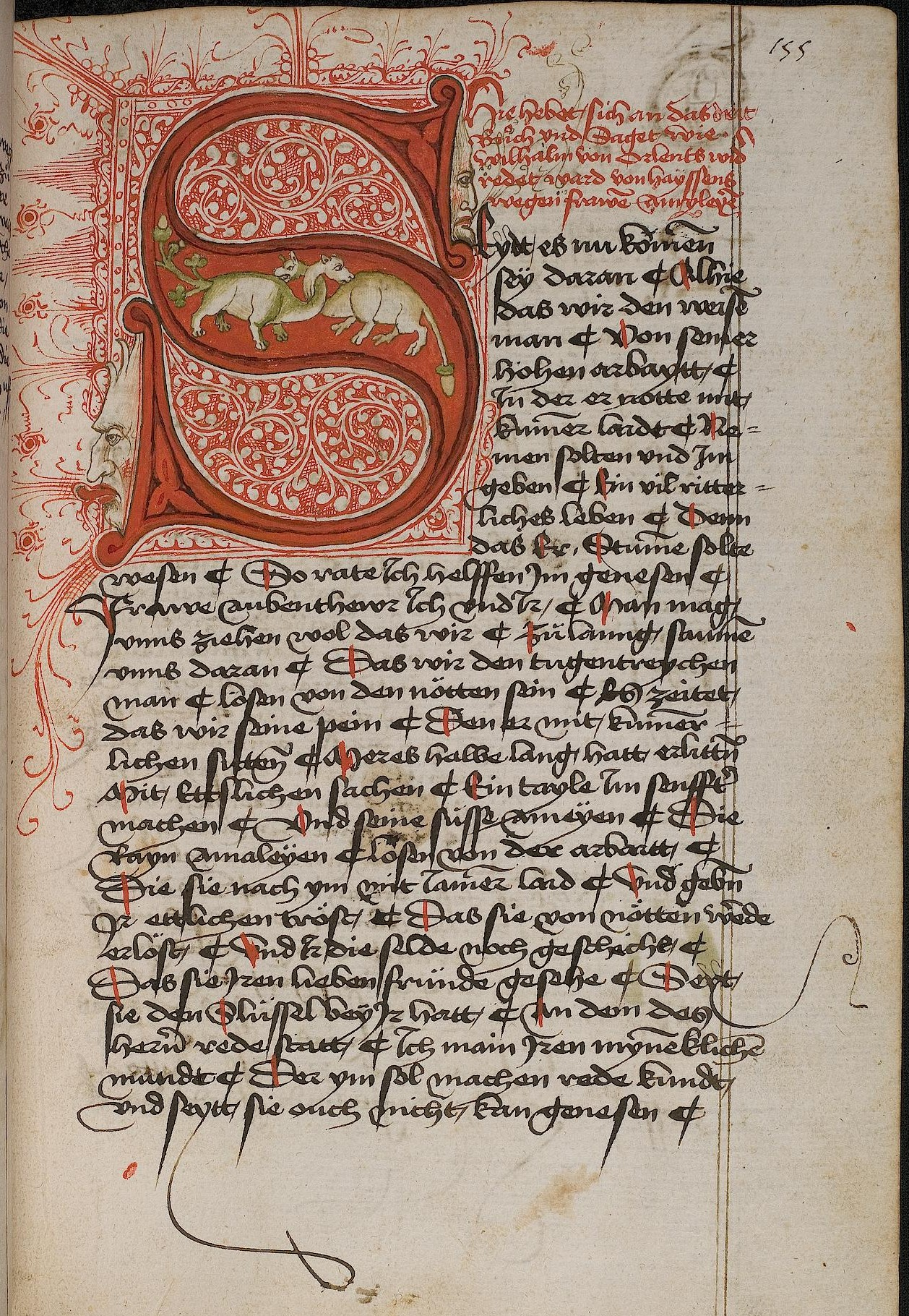 Codex Palatinus germanicus 4, Blatt 155r der Handschrift: "Rudolf von Ems, Willehalm von Orlens", S-Initiale auf Fleuronnéegrund, im Buchstabenkörper zwei Drachen, an den Hälsen umeinander geschlungen, rechts und links an den Außenseiten des Buchstabens je ein Gesicht (Fratze).